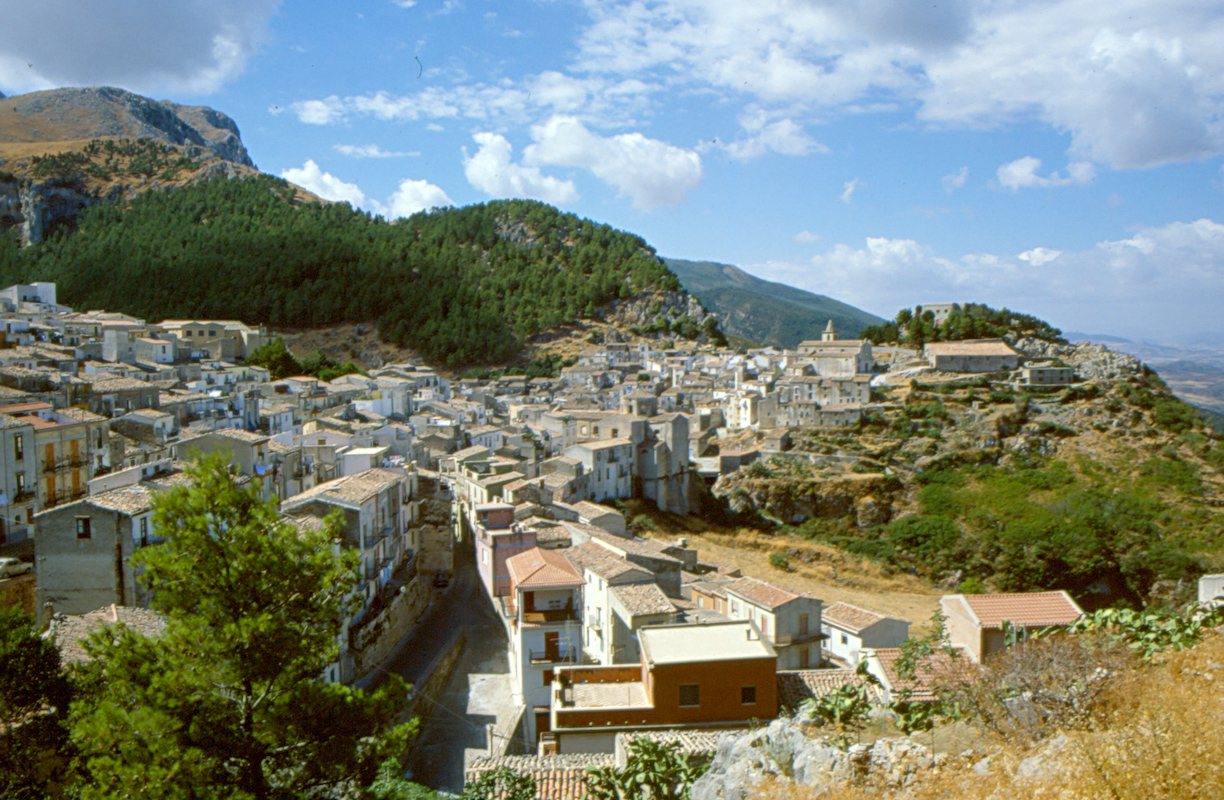 Gratteri, provincia di Palermo, Italy